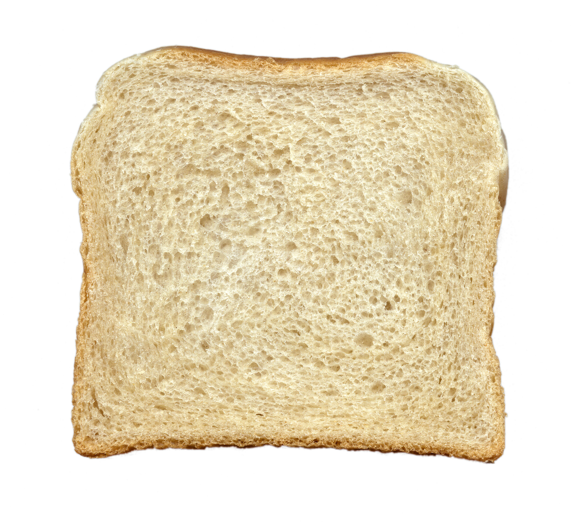 Bread slice, untoasted